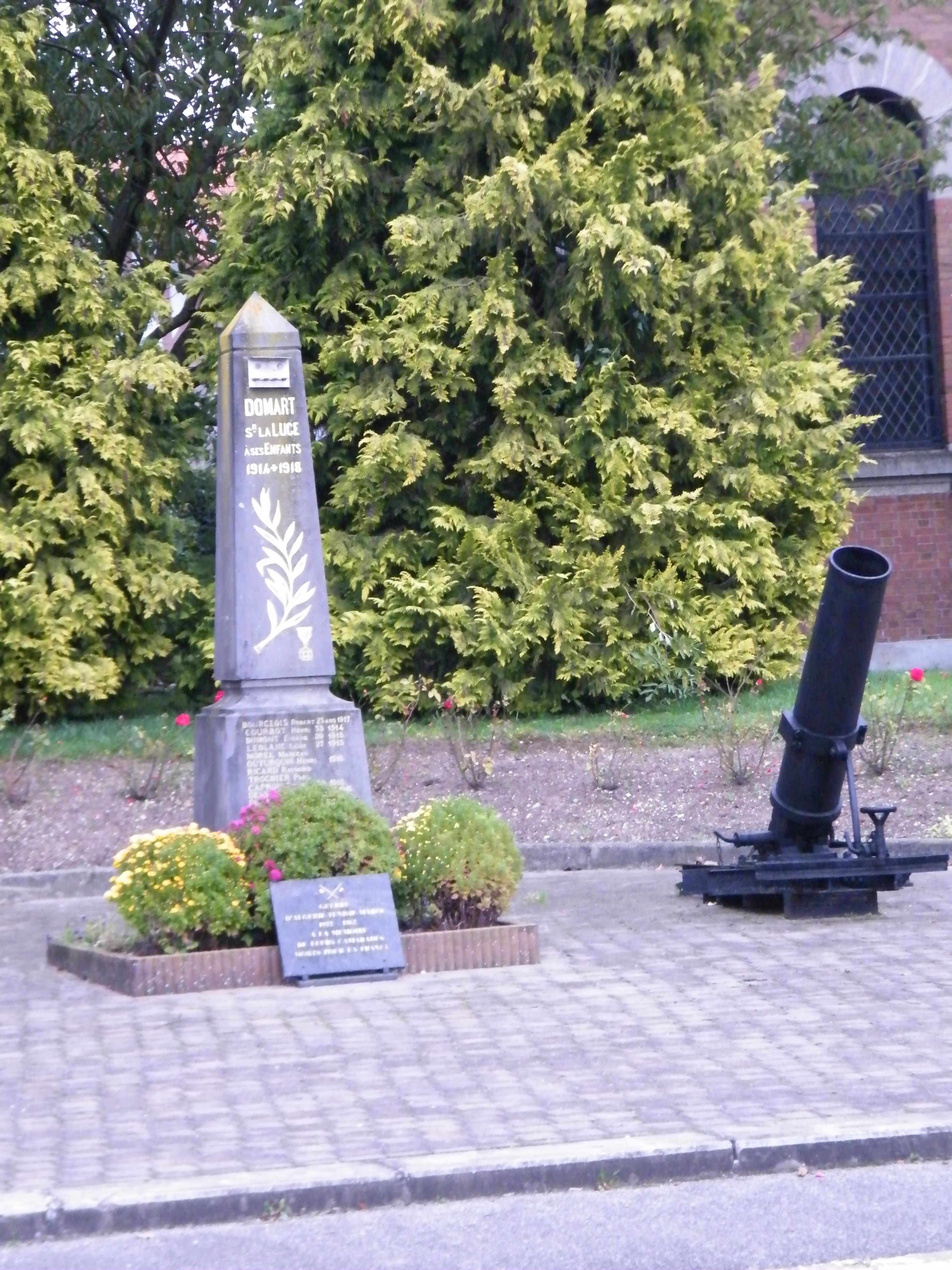 Monument.